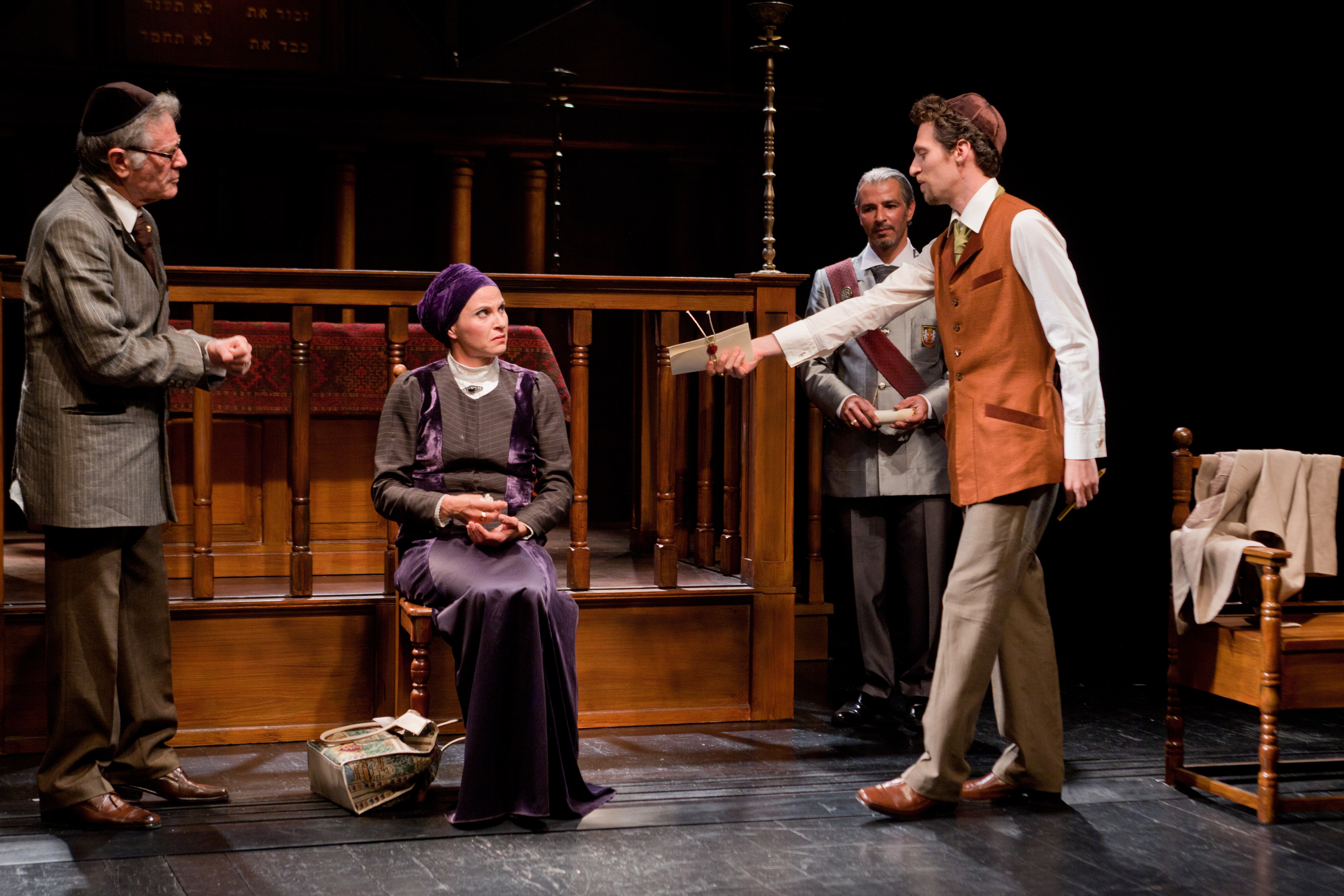 ויטלי פרידלנד, יוסי עיני, כרמית מסילתי-קפלן ואבי פניני בהצגה "ירושלים החדשה", בבימויו של סיני פתר, תיאטרון החאן